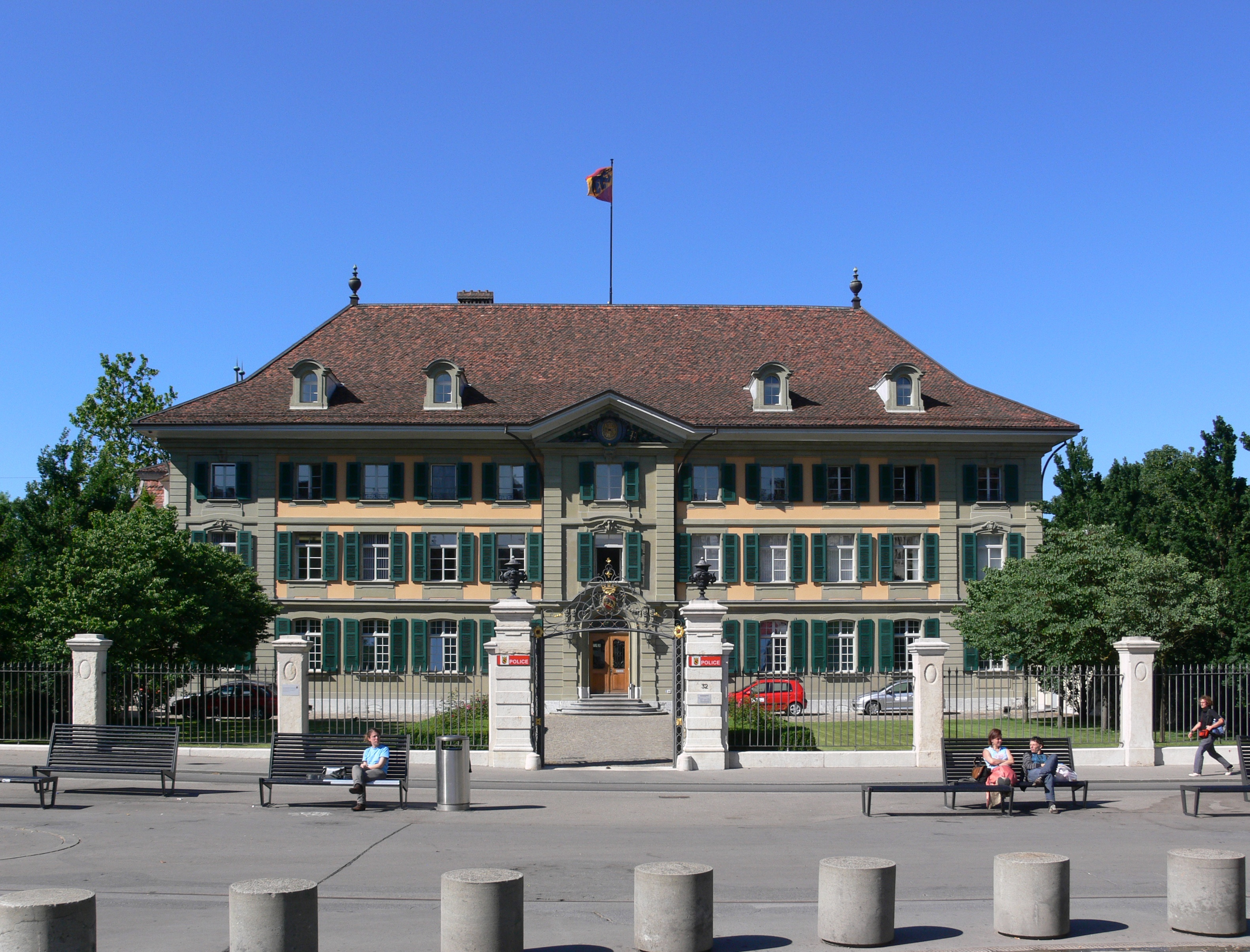 Polizeikommando des Kantons Bern (ehem. Waisenhaus), Waisenhausplatz, Bern